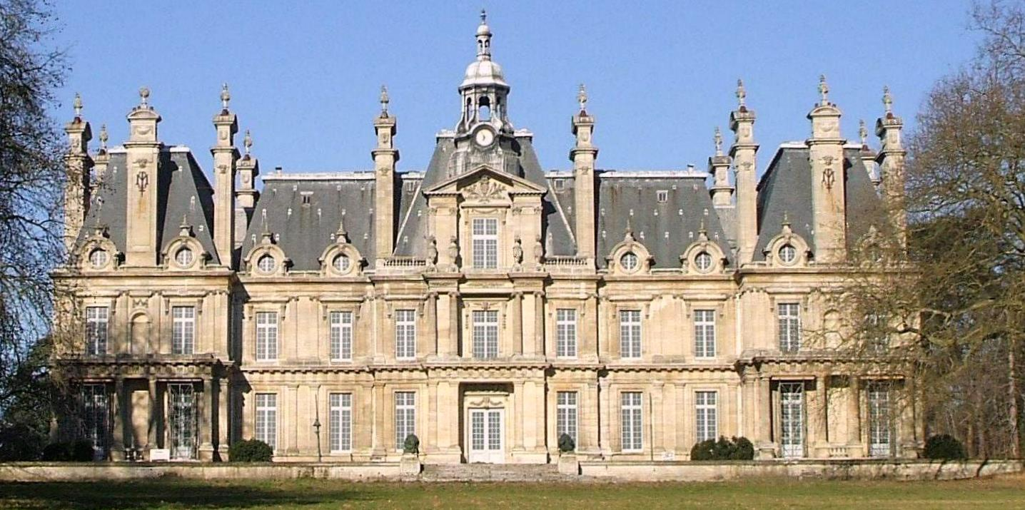 chateau de Saint-Martin-du-Tertre (Val-d'Oise). castle of Saint-Martin-du-Tertre (Val-d'Oise)